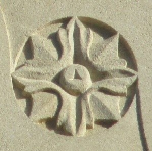 Kartoffelblüte am alten Rathaus in Luxemburg Stadt am Krautmarkt (Palais Grand-ducal)